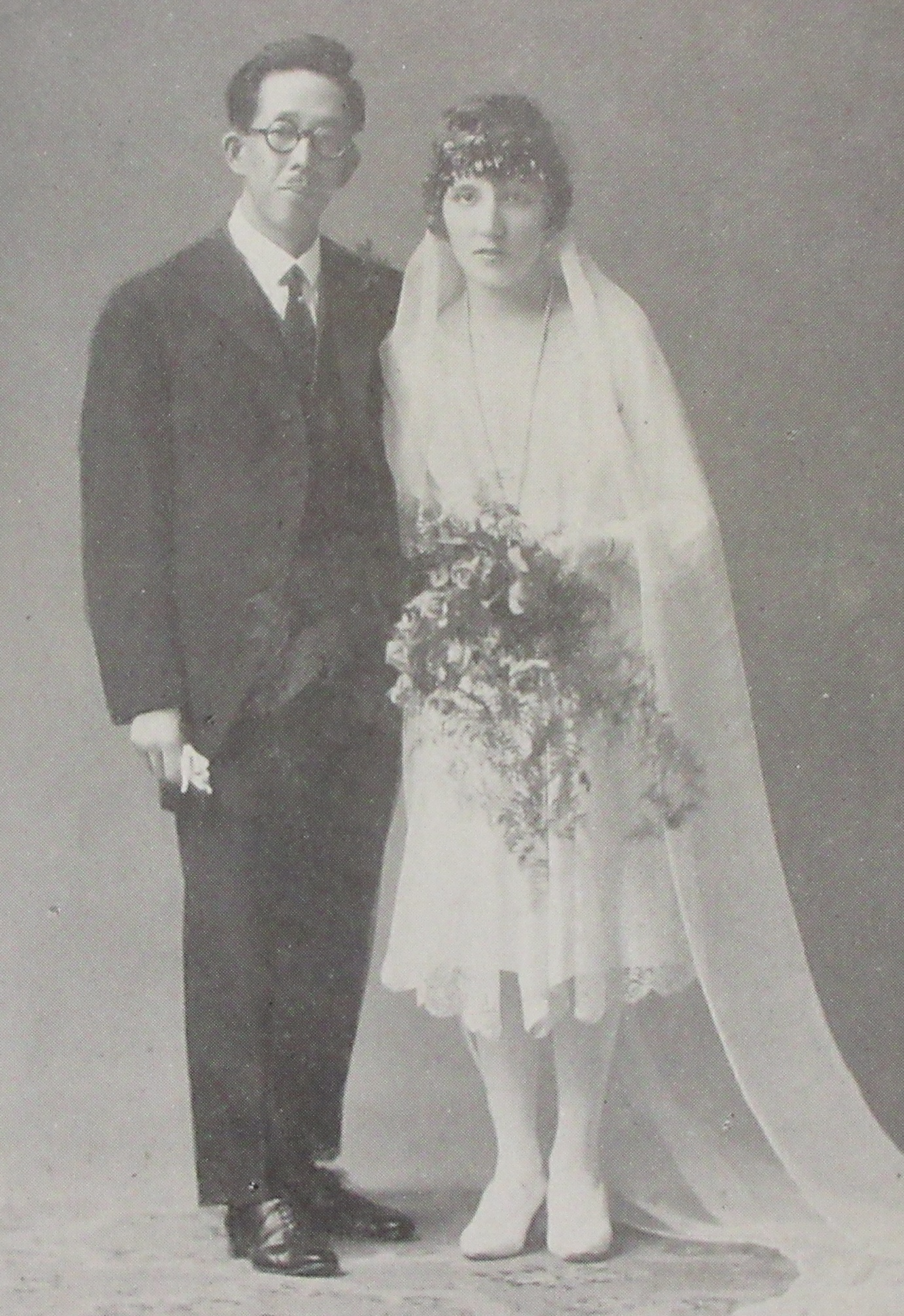 小林錡と妻のゲルト・ルード。1927年撮影。